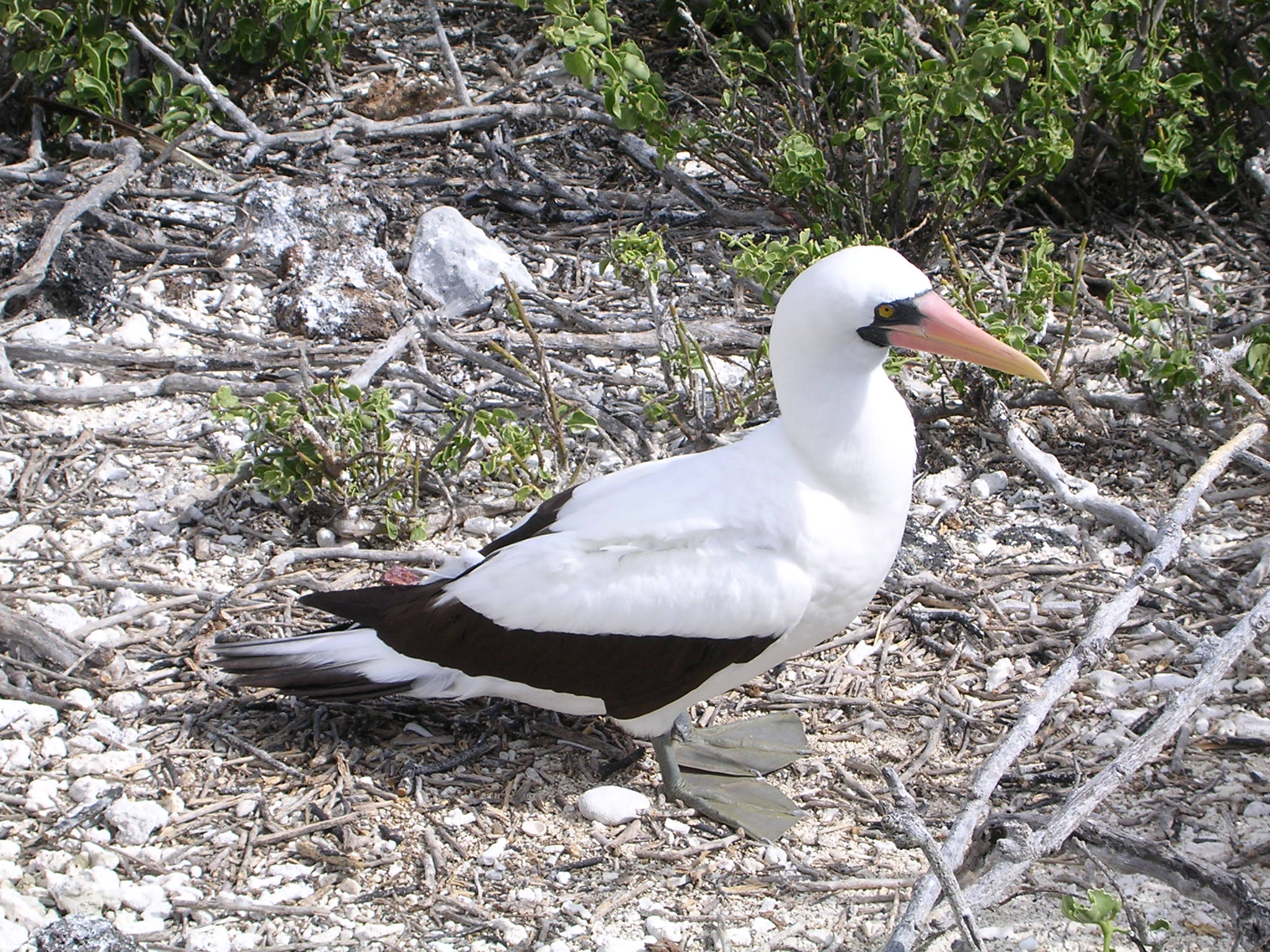 A Nazca booby (Sula granti) in the Galápagos Islands (Mascarell de Nazca; Piquero de Nazca)